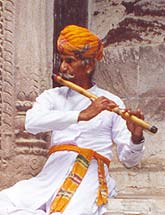 Joueur de Banshri dans le fort de Jodhpur